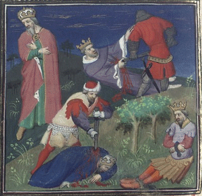 Frédéric II se lamentant devant la mort de Manfred et l'emprisonnement d'Enzio, par Giovanni Boccaccio, enluminure issue de l'ouvrage De casibus, France, XV° siècle. BNF Fr.226, f.261v.